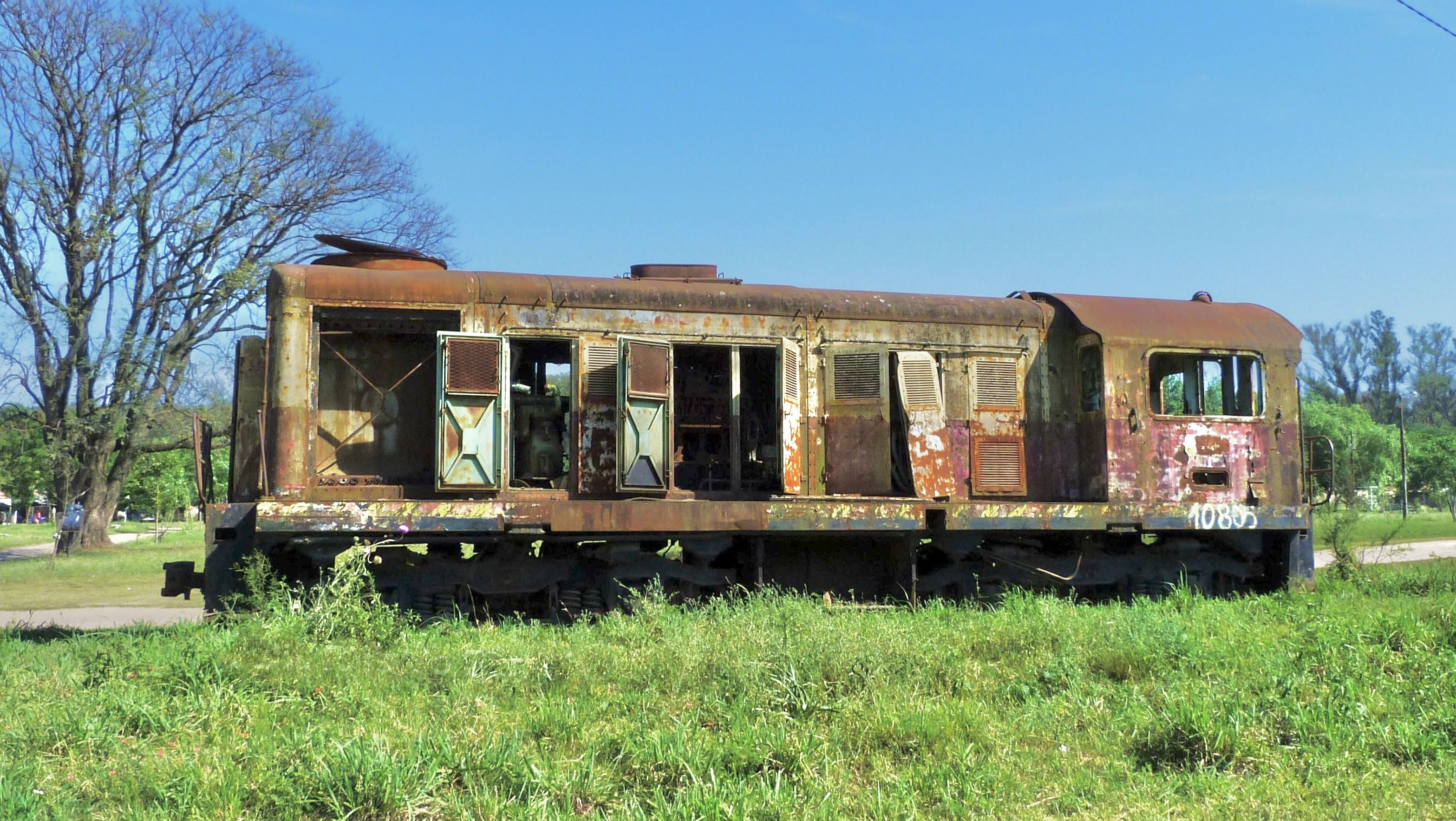 Locomotora diesel abandonada, hay mucho material ferroviario abandonado en lo que fueron los Talleres del Ferrocarril de Laguna Paiva